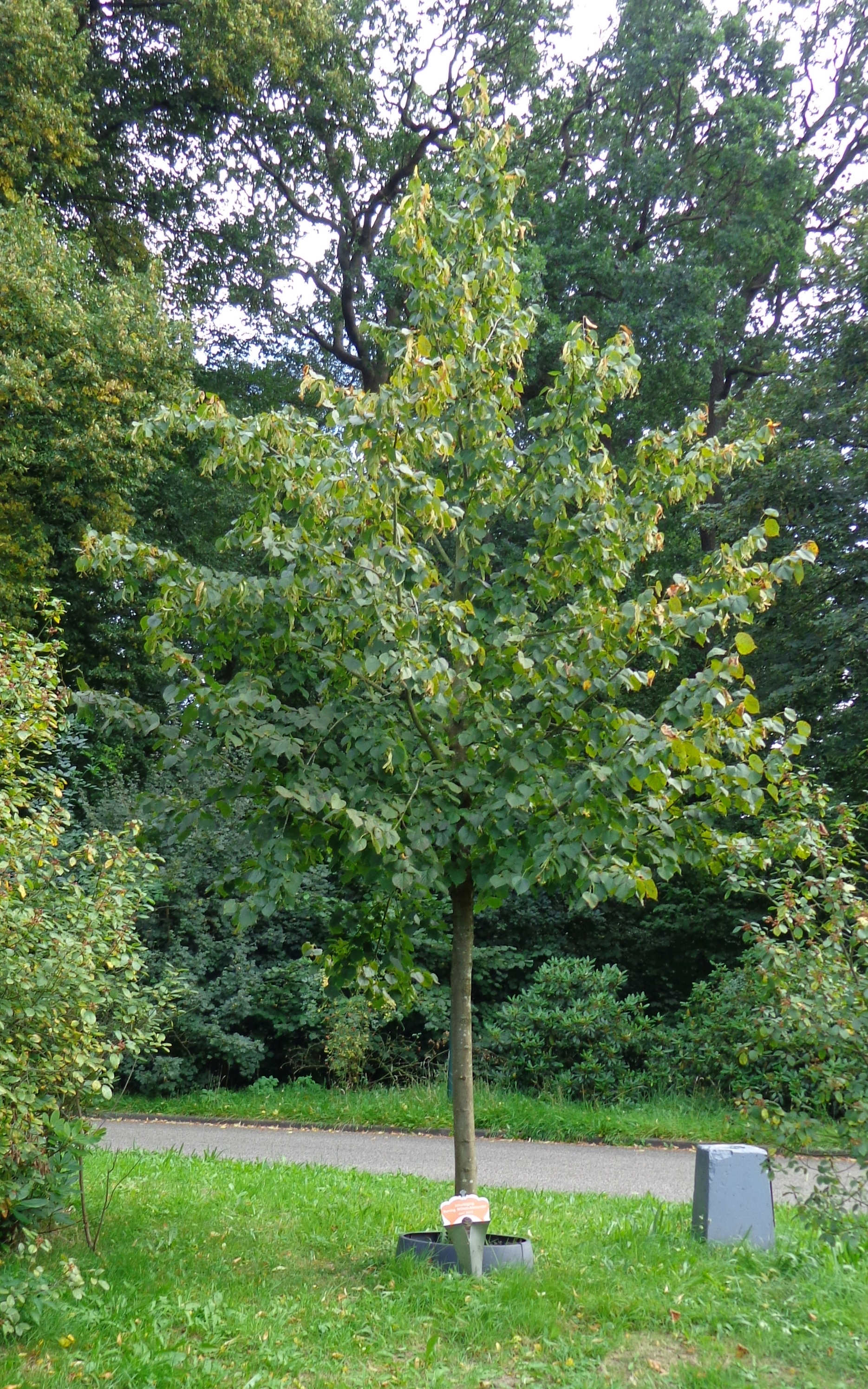 Willem-Alexanderboom te Driebergen De tekst op het bordje luidt: "Inhuldiging Koning Willem-Alexander april 2013"